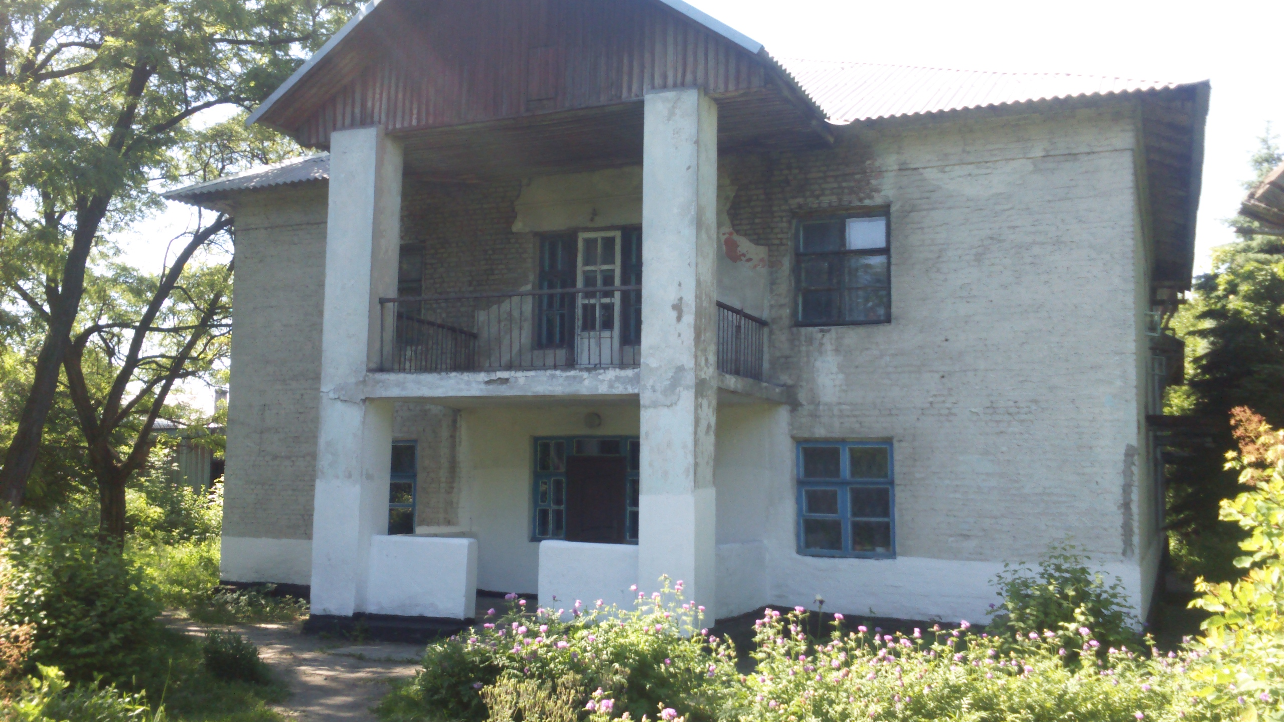 Водя́нське — селище міського типу Донецької області, підпорядковане Білицькому, розташоване на річці Водяна за 93 км від Донецька. Відстань до райцентру становить близько 6 км і проходить автошляхом місцевого значення.